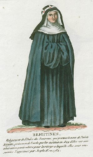 Collection de costumes de tous les ordres monastiques, supprimés à differentes époques, dans la ci-devant Belgique, Bruxelles, Philippe Joseph Maillart et sœur, 1811